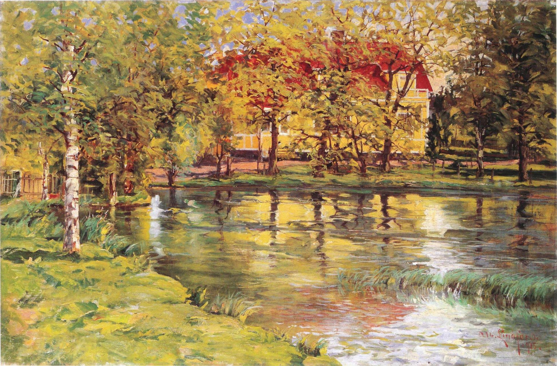 Albert Lindforsin maalaus Forssasta. Kuuluu Taidesäätiö Meritan kokoelmiin.